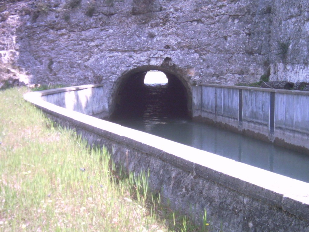 Le canal de Marseille dans les plaines d'Arbois, entre l'aqueduc de Roquefavour (sur Ventabren) et le réservoir de Réaltor (sur Cabriès) : un passage en tunnel.